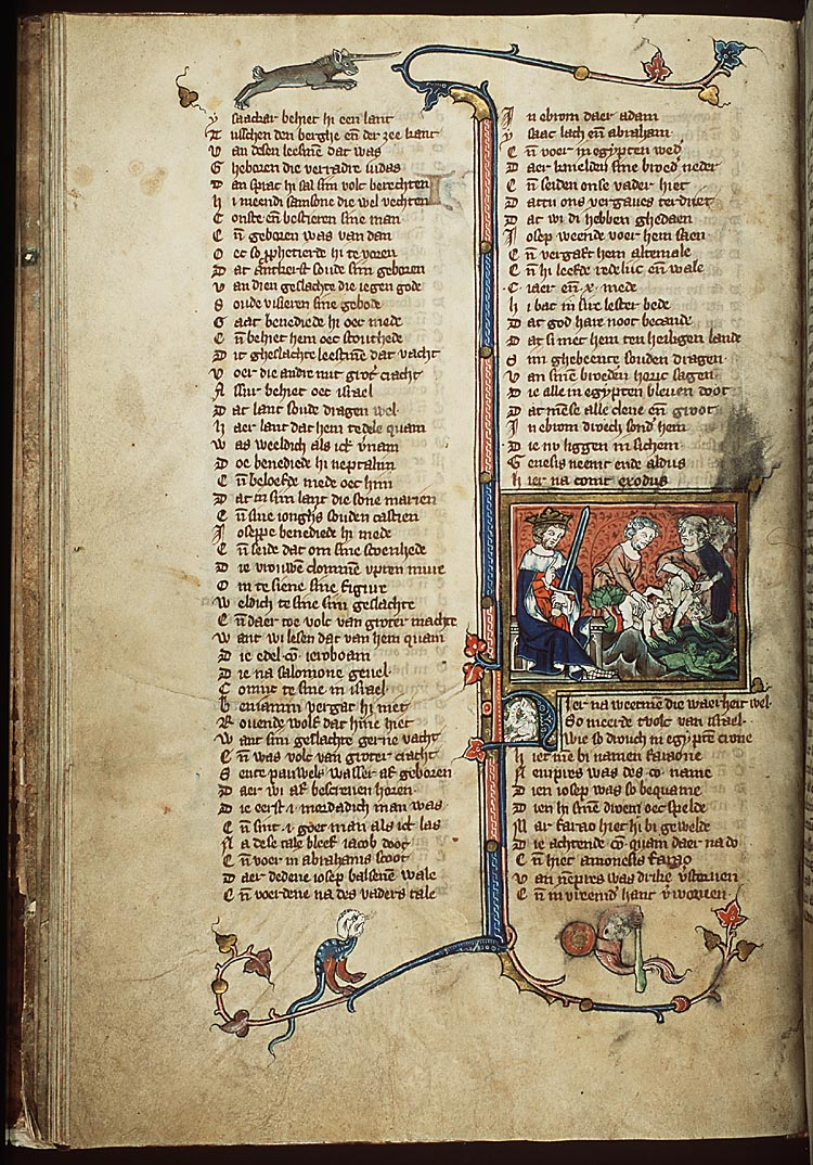 Jacob van Maerlant, Rijmbijbel folio 20 verso verlucht door Michiel van der Borch te Utrecht in 1332. Pagina bevat passage uit Exodus met de farao die opdracht geeft alle pasgeboren Israëlische jongetjes te verdrinken